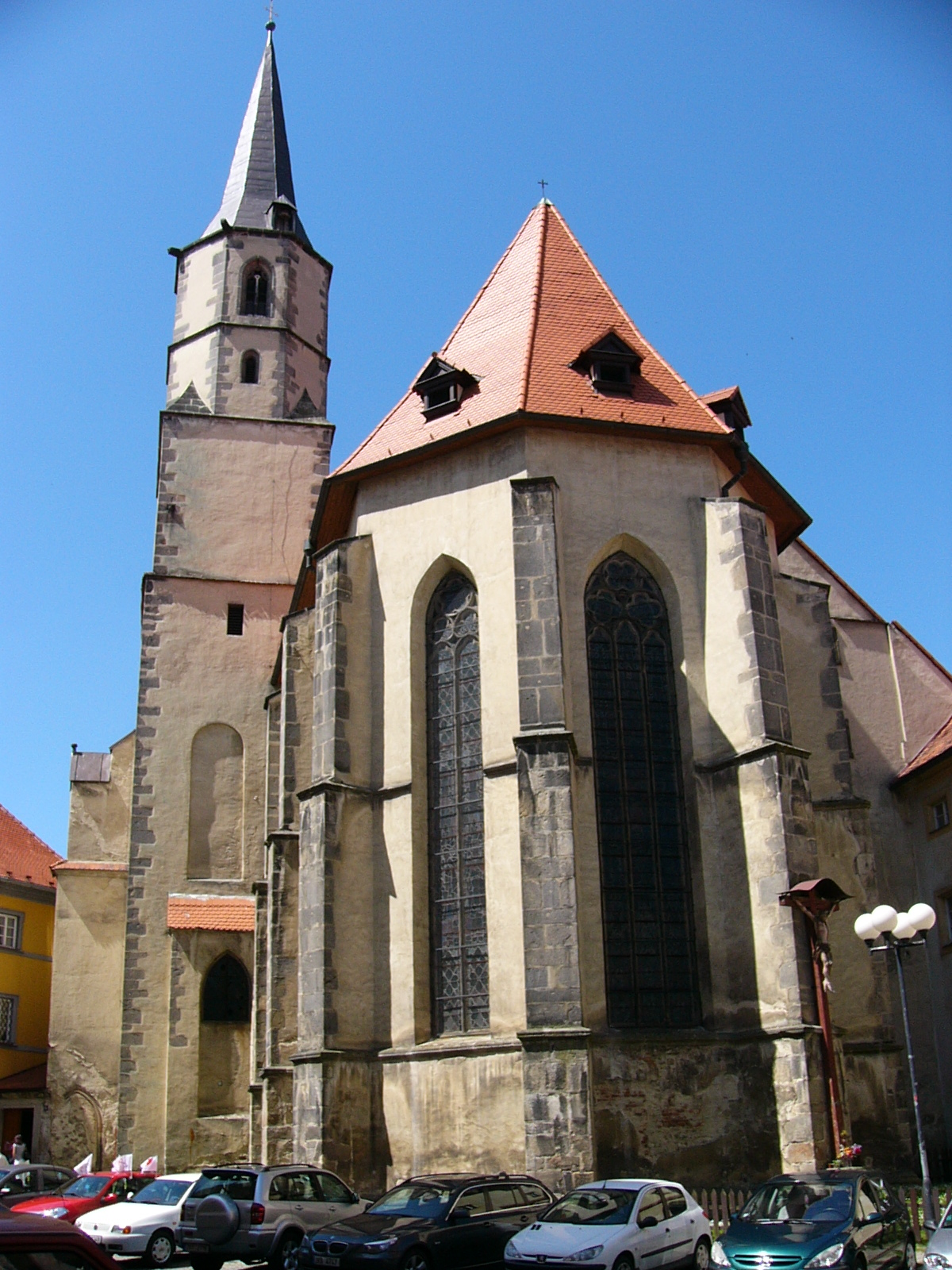 Historische Innenstadt, Eger, Cheb